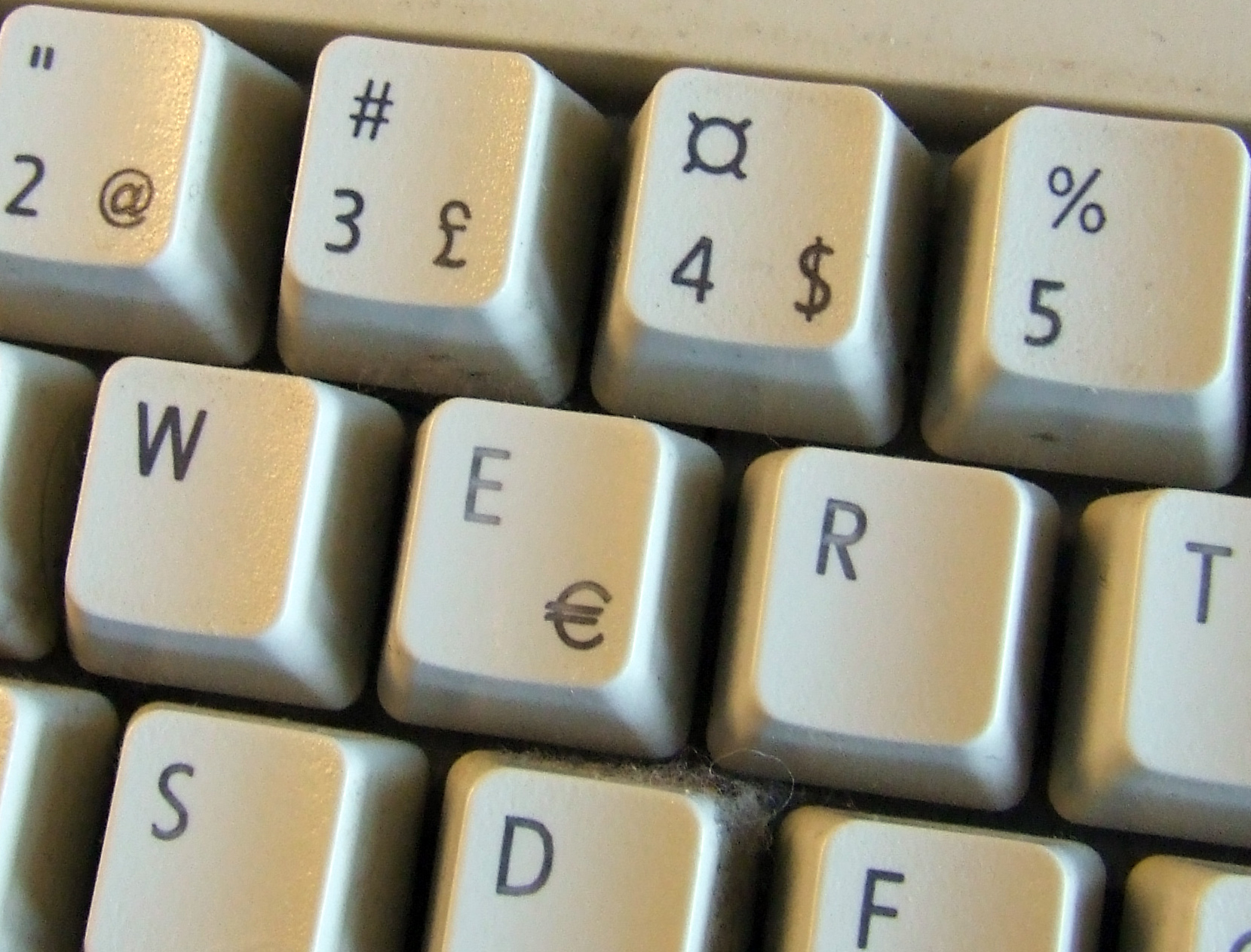 Udsnit af et tastatur hvor man kan bl.a. se tasten [4]